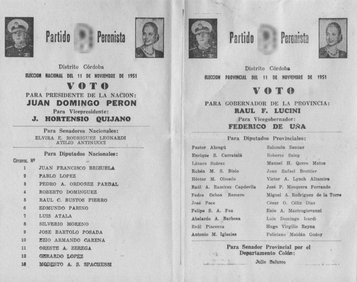 Boleta electoral para las elecciones presidenciales de 1951 en Argentina, representando la fórmula Perón-Quijano.